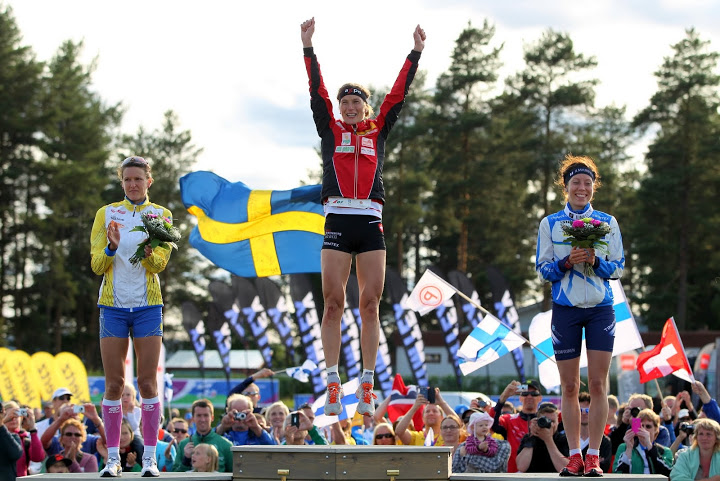 Sprint final 2013, WOC 2013, 19